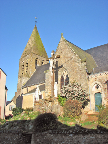 Parné-sur-Roc (Mayenne) - Eglise St Pierre